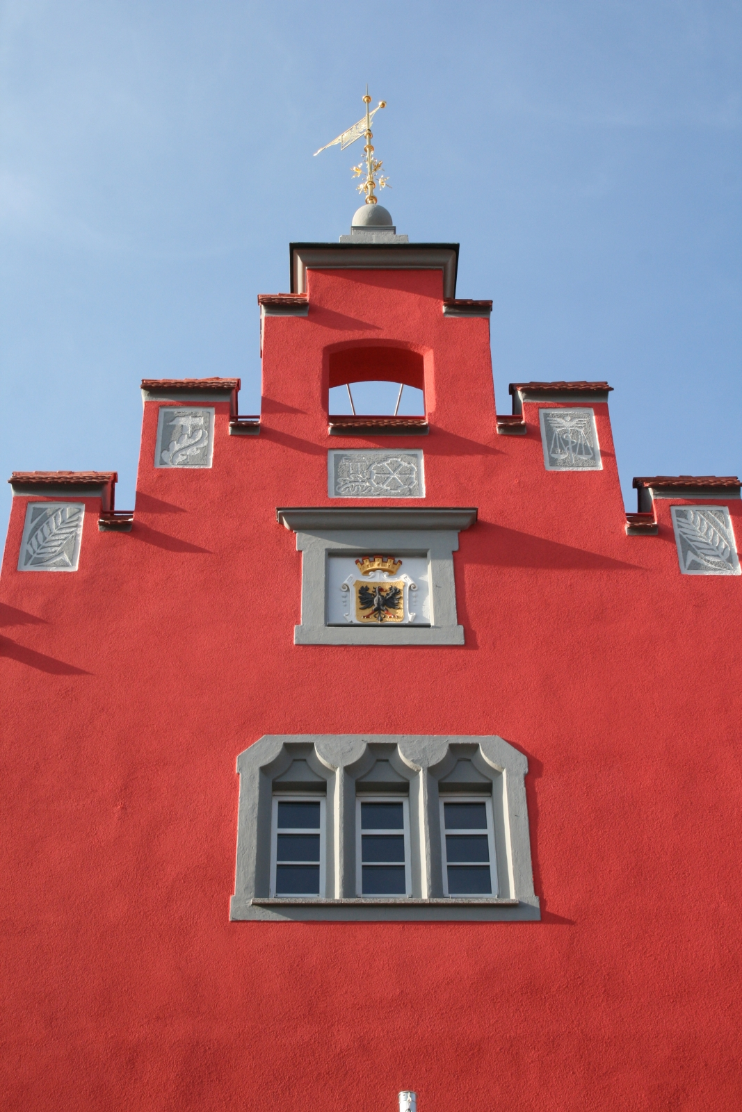 Detail Rathaus Erbendorf